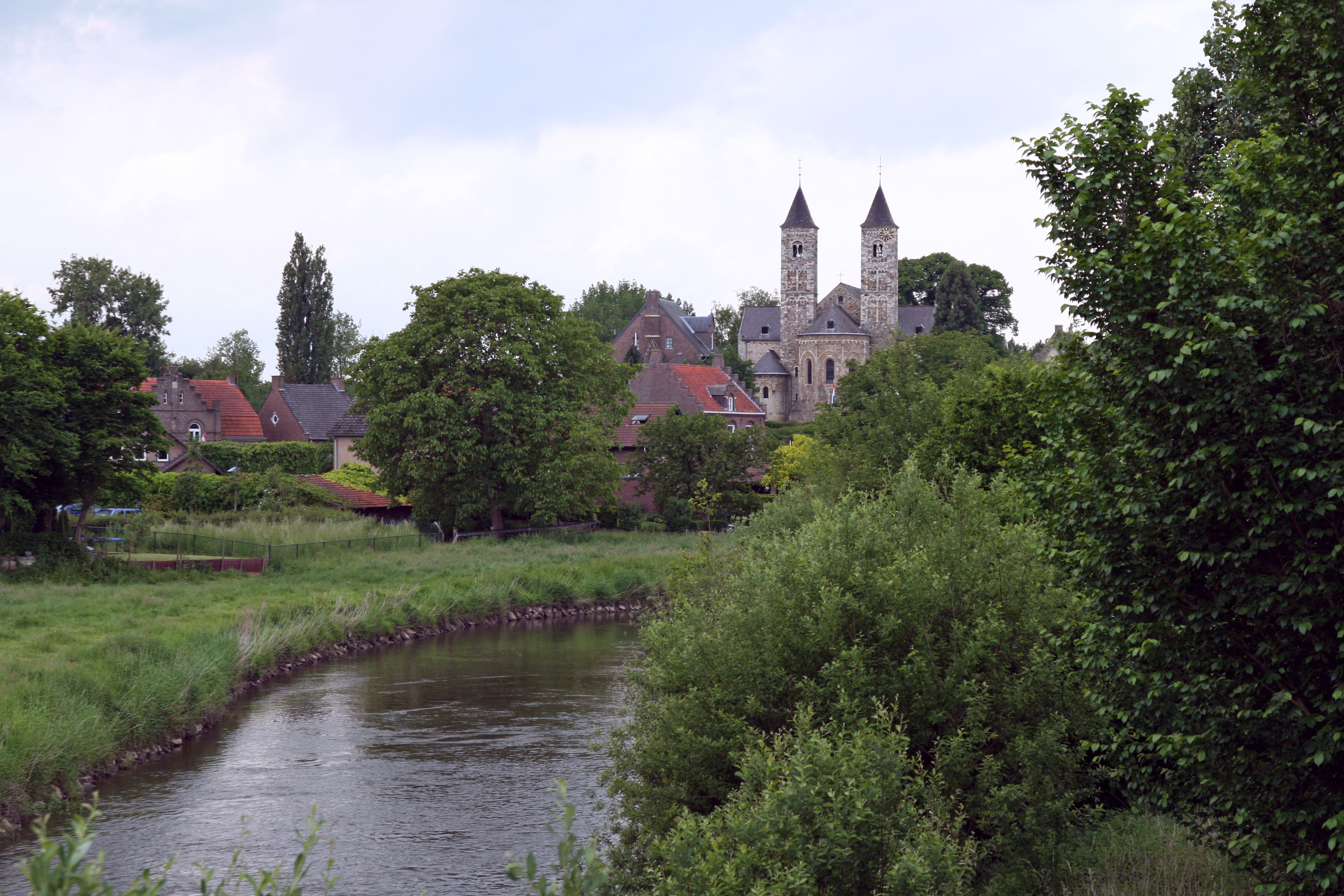 Blik vanaf de Roerbrug op St. Odiliënberg